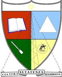 Escudo de Sutatenza